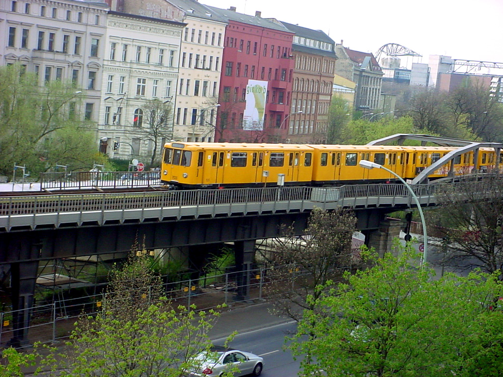 Foto tomada por mi en Berlin, en la fotografia se ve el metro en la linea 1, la mas antigua de berlin, cercano a la estacion Hallesches Tor.